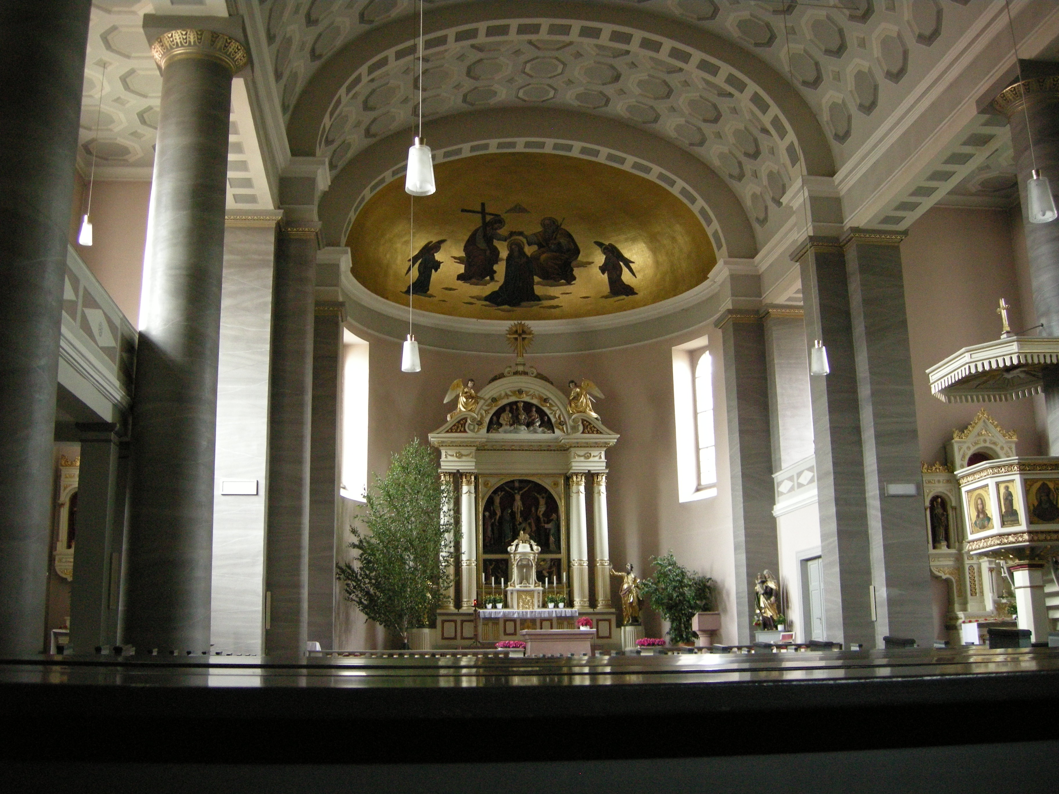 St. Dionysiuskirche Frankfurt-Sindlingen, erbaut von Carl Florian Goetz 1823-1825